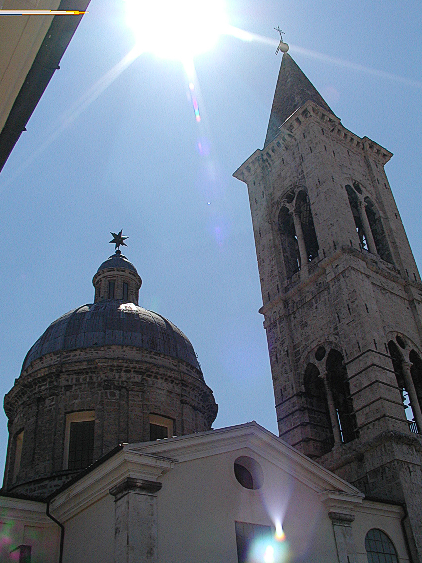 Sulmona -Santissima Annunziata- 2007